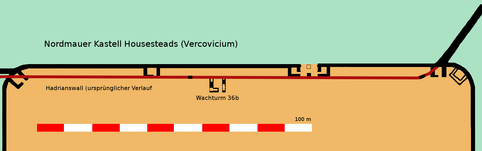 Befundplan Nordsektor des Kastell Housesteads 1945.